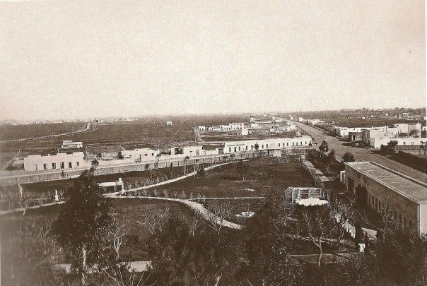 Vista desde la quinta de Lezama en Buenos Aires (hoy Museo Histórico Nacional) hacia el sur. A la derecha, la actual calle Defensa y su continuación Avenida Patricios. Atravesando la imagen en diagonal, la actual Avenida Martín García, Hacia el fondo, surge desde la izquierda la vía del Ferrocarril a Ensenada, y a lo lejos se ve el actual barrio de La Boca.